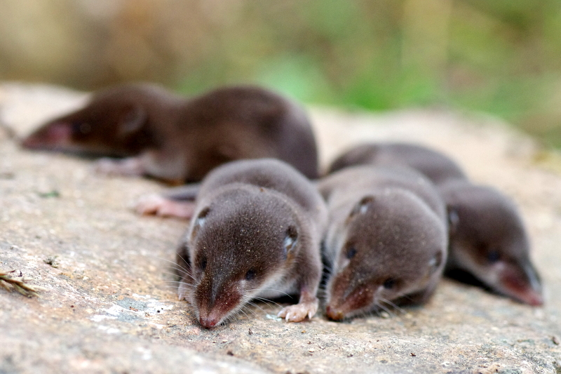 Młode ryjówki aksamitne (Sorex Araneus)